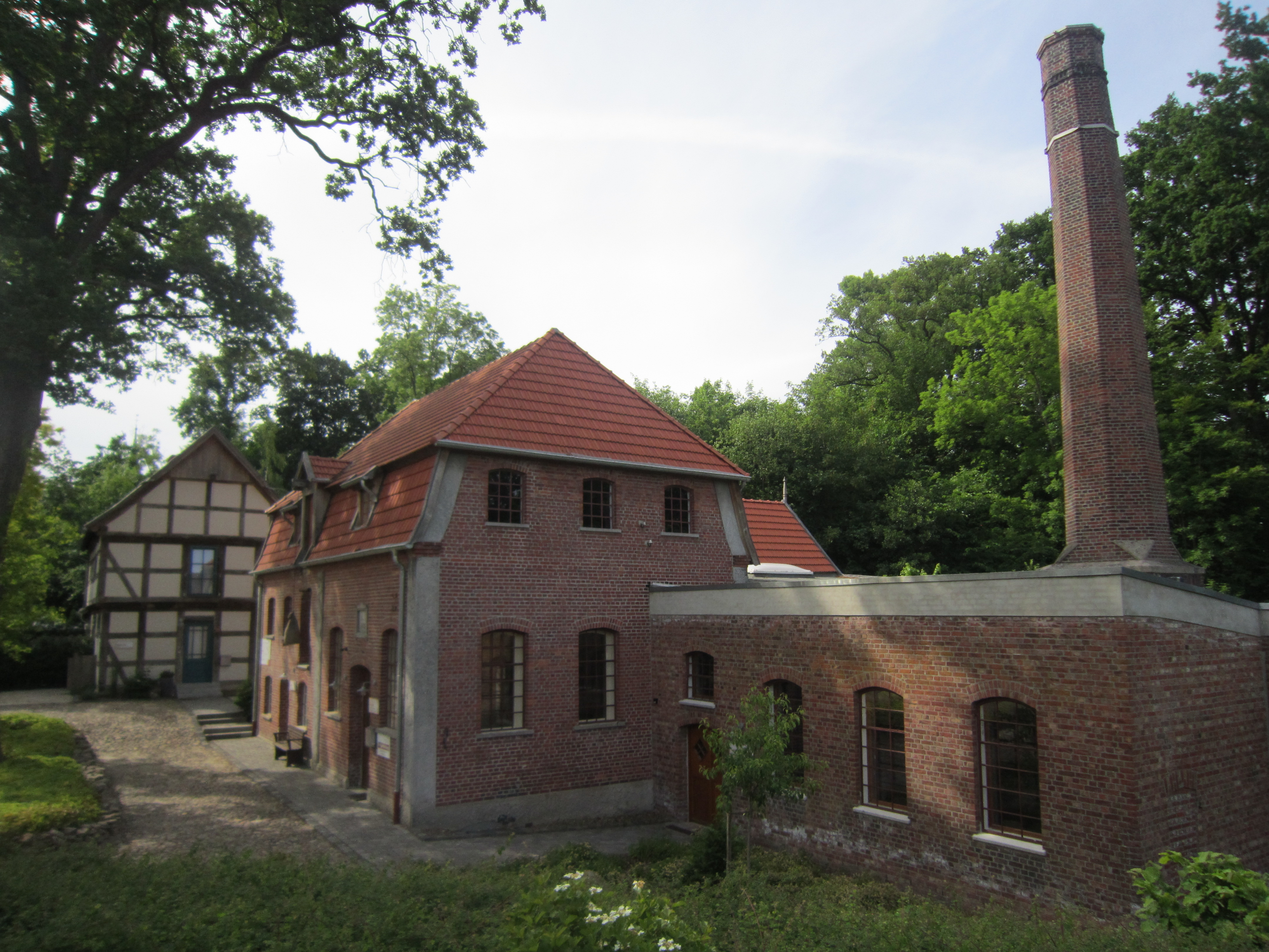 Das Industriedenkmal Bredemeyers Hof befindet sich an der Landesstraße von Vechta nach Twistringen in Goldenstedt (Landkreis Vechta in Niedersachsen). Nach umfangreichen Rekonstruktionsarbeiten wurde der Gebäudekomplex 2017 der Öffentlichkeit zugänglich gemacht. Er besteht seitdem aus einem Fachwerkspeicher aus dem Jahr 1722 (hinten links), einem Elektrizitätswerk aus dem Jahr 1907 (in der Bildmitte), einem Kesselhaus mit einem Schornstein (18 m) aus dem Jahr 1881 (vorne rechts), einer alten Getreidemühle mit drei Mahlwerken aus dem Jahr 1912, einer Wagenremise aus dem Jahr 1887 sowie einem Turbinenhaus und Teilen einer erstmals im 17. Jahrhundert erwähnten Wassermühle.